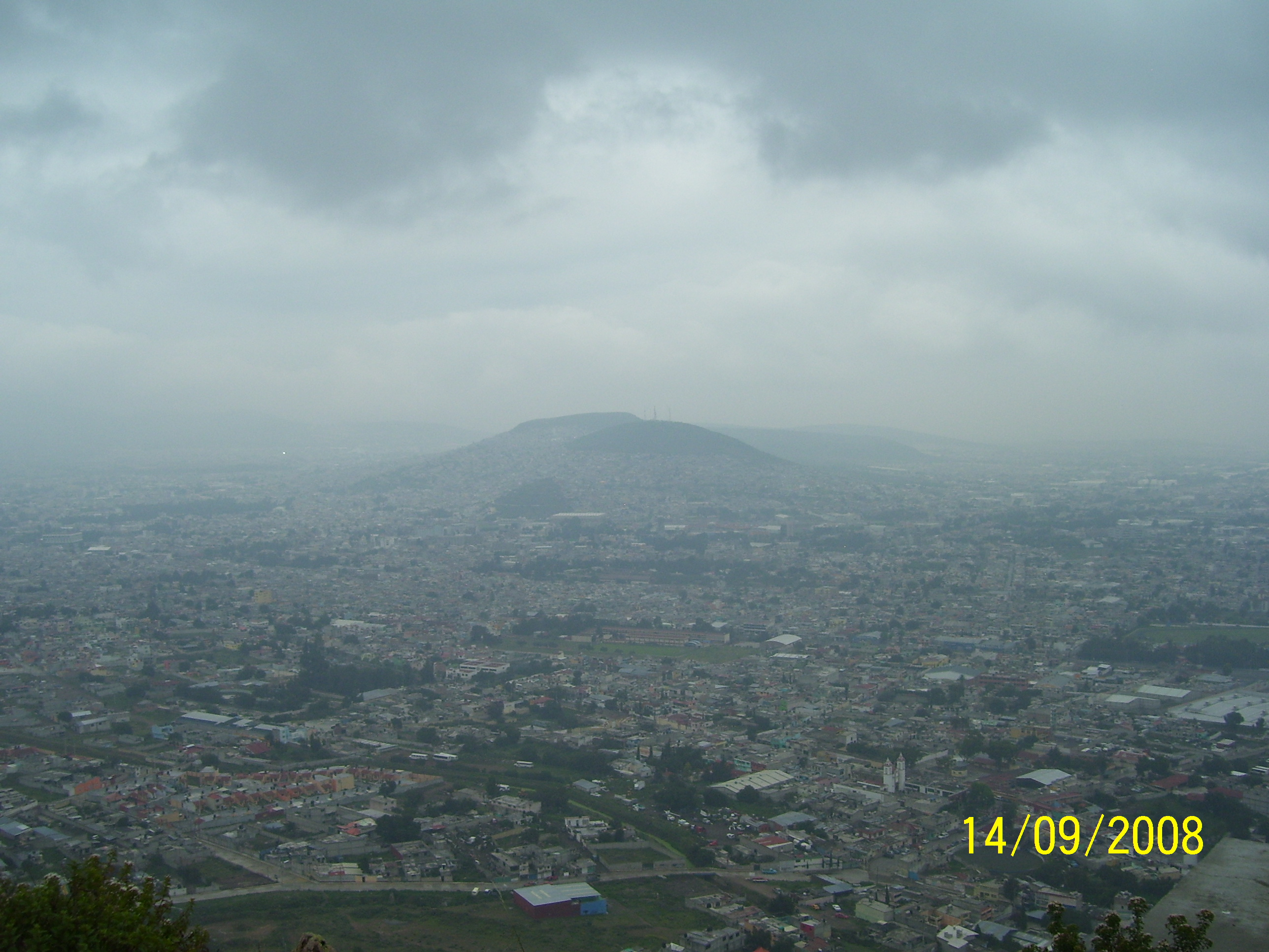 La antigua "Villita" en el cerro "Redondo"